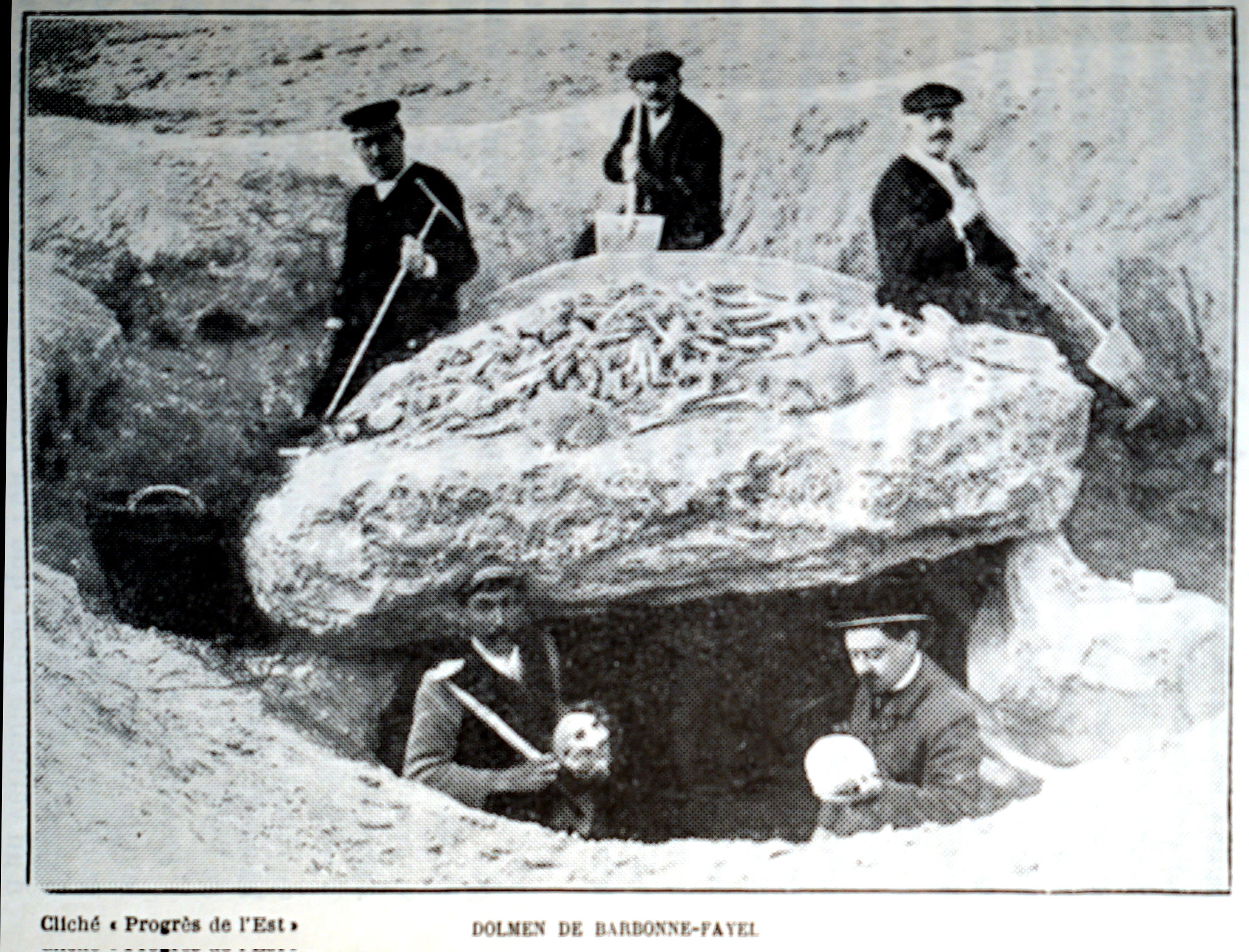 Barbonne fayel fouilles du tumulus publié dans les travaux de l'académie de reims en 1913